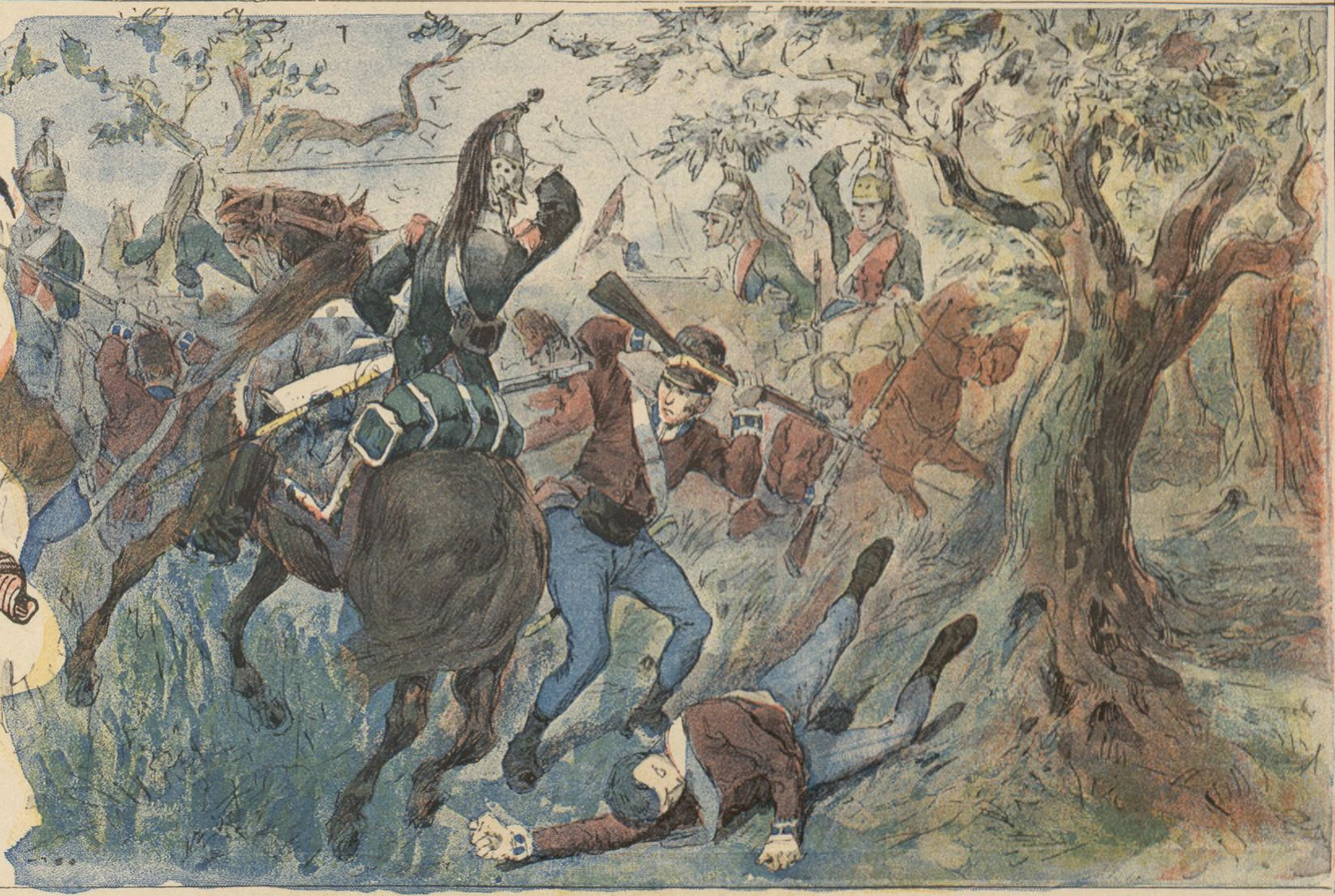 À la journée d'Ocana, le 12e prend part au début de la bataille en chargeant à travers bois l'infanterie espagnole qui n'ose pas se former en carré.